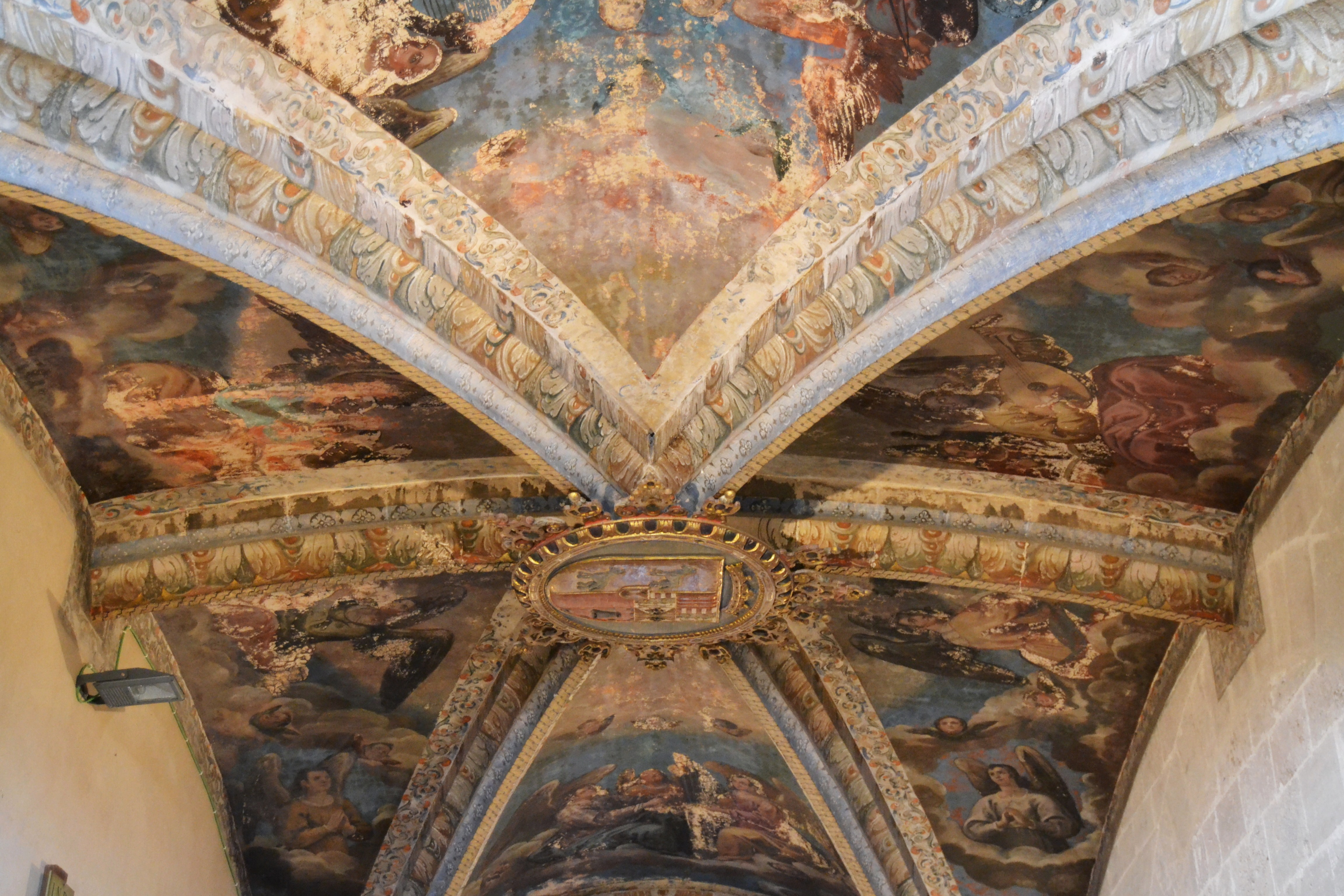 Monestir de la Trinitat de València, volta del cor baix.